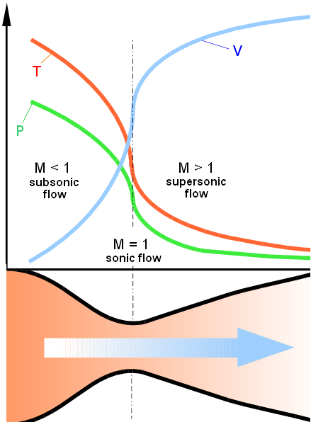 Диаграмма, иллюстрирующая работу сопла Лаваля; T - абсолютная температура газа; P - давление; V - скорость; М - Число Маха